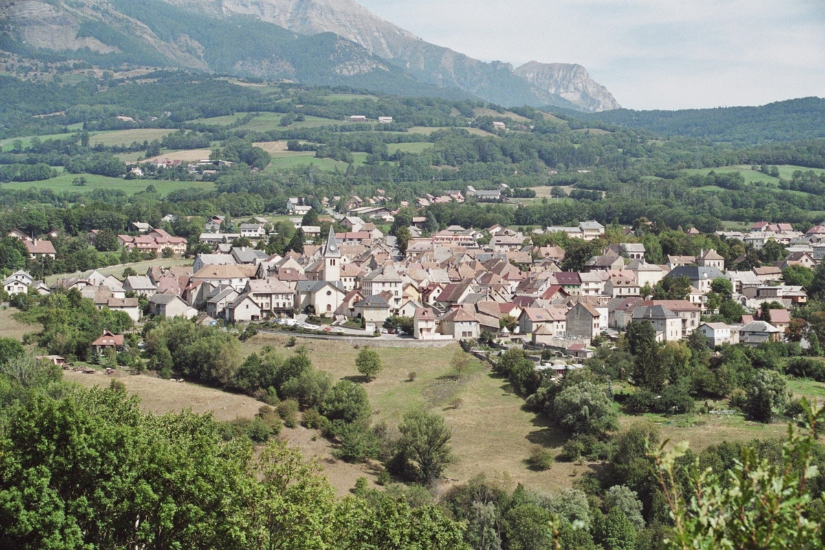 Saint-Bonnet-en-Champsaur, vue générale